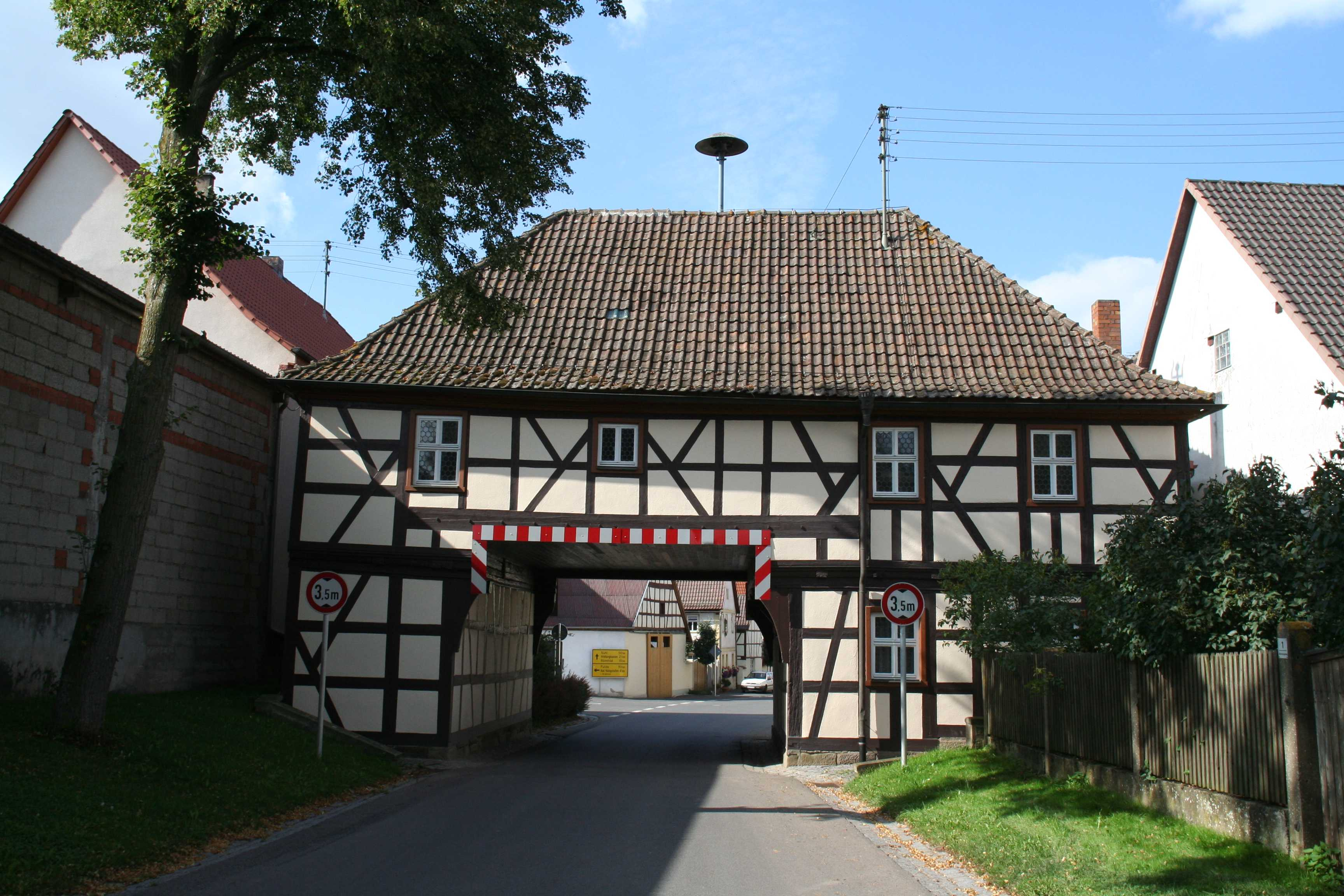 Rathaus Trappstadt im Landkreis Rhön-Grabfeld in Bayern